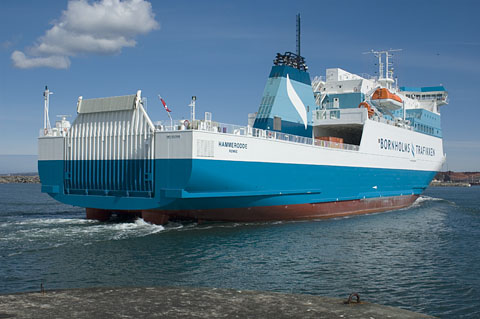 BornholmerFærgen - MS Hammerodde close to Rønne - IMO: 9323699 - Call Sign: OYAX